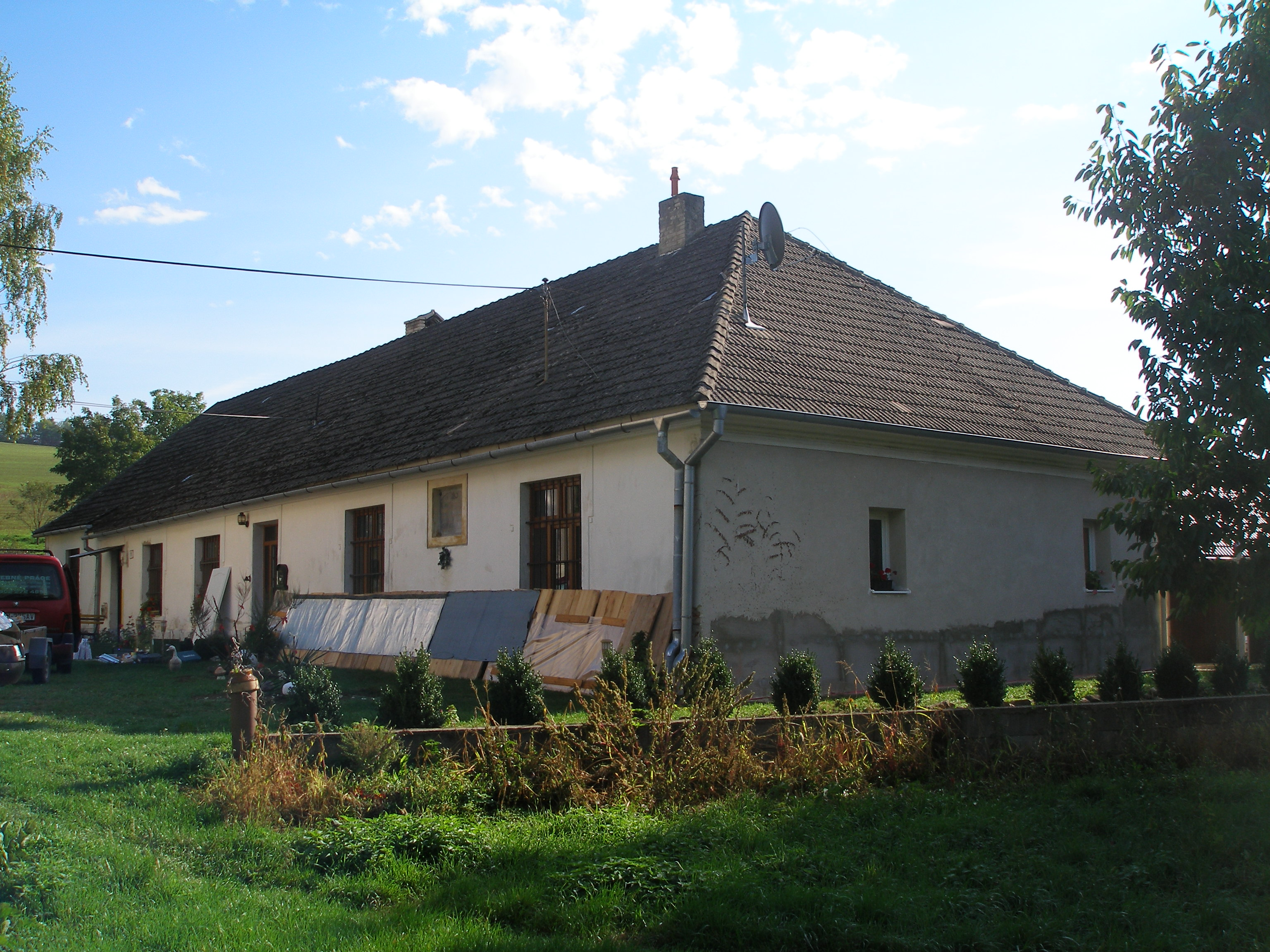 Rodný dům Ľudovíta Vladimíra Riznera v Zemianskom Podhradie (pohled od západu).